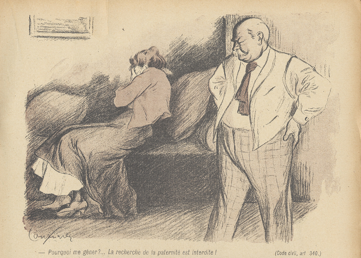 "Pourquoi me gêner ?... La recherche de paternité est interdite !" (Code civil, art. 340). Caricature parue dans L’Assiette au beurre du 13 décembre 1902